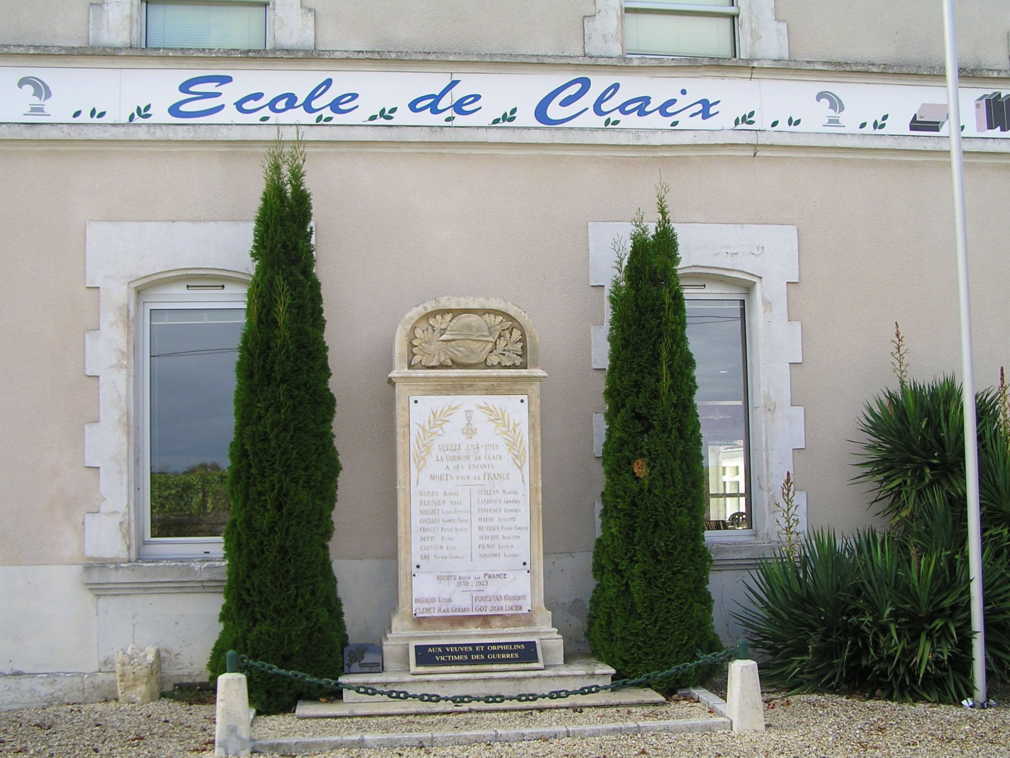 monument aux morts de Claix